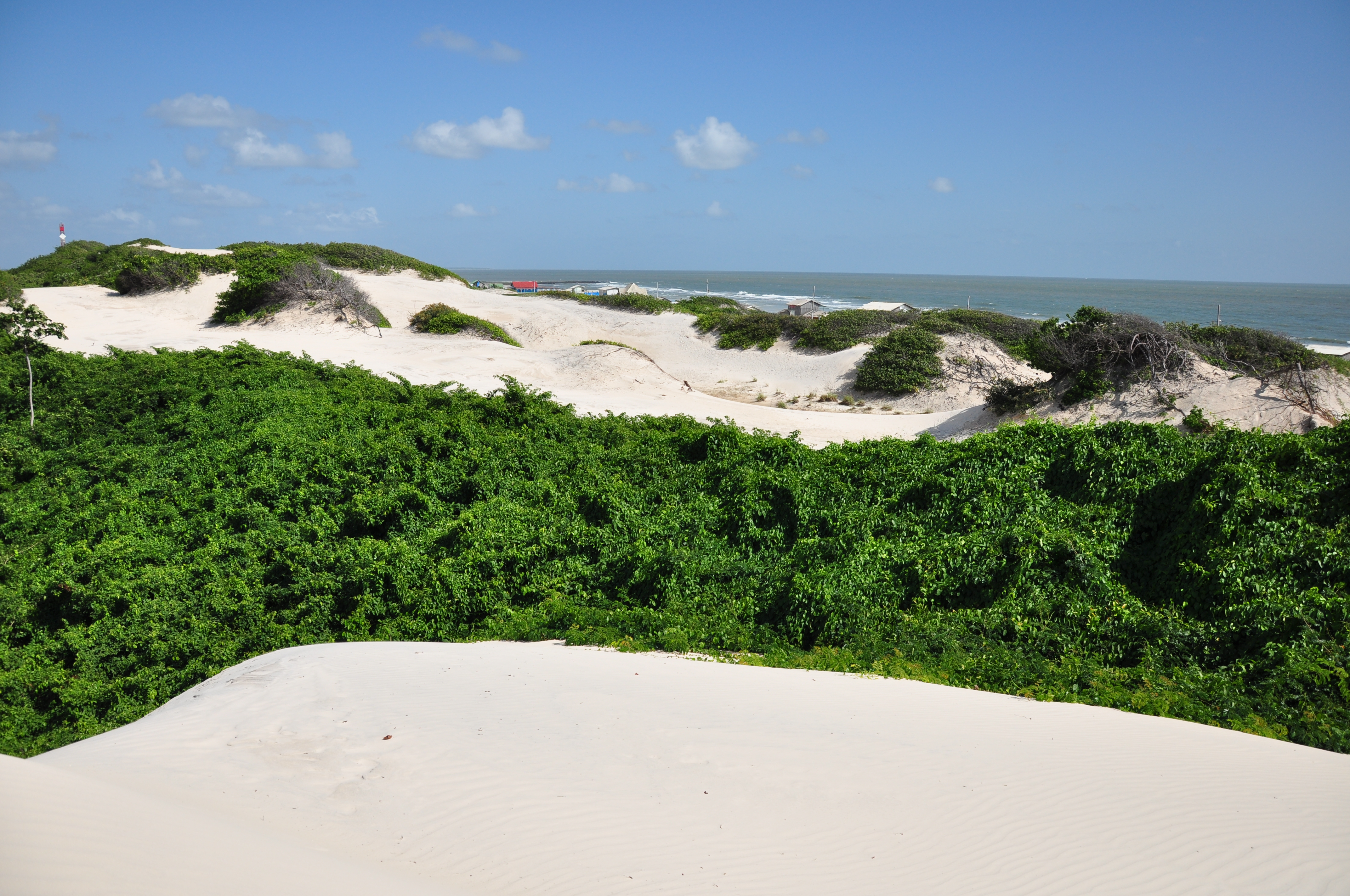 Pôr do sol em Algodoal